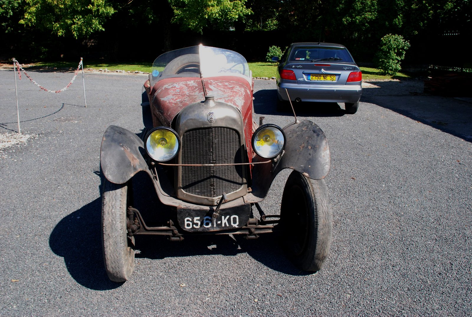 Citroën B2 Caddy 1923